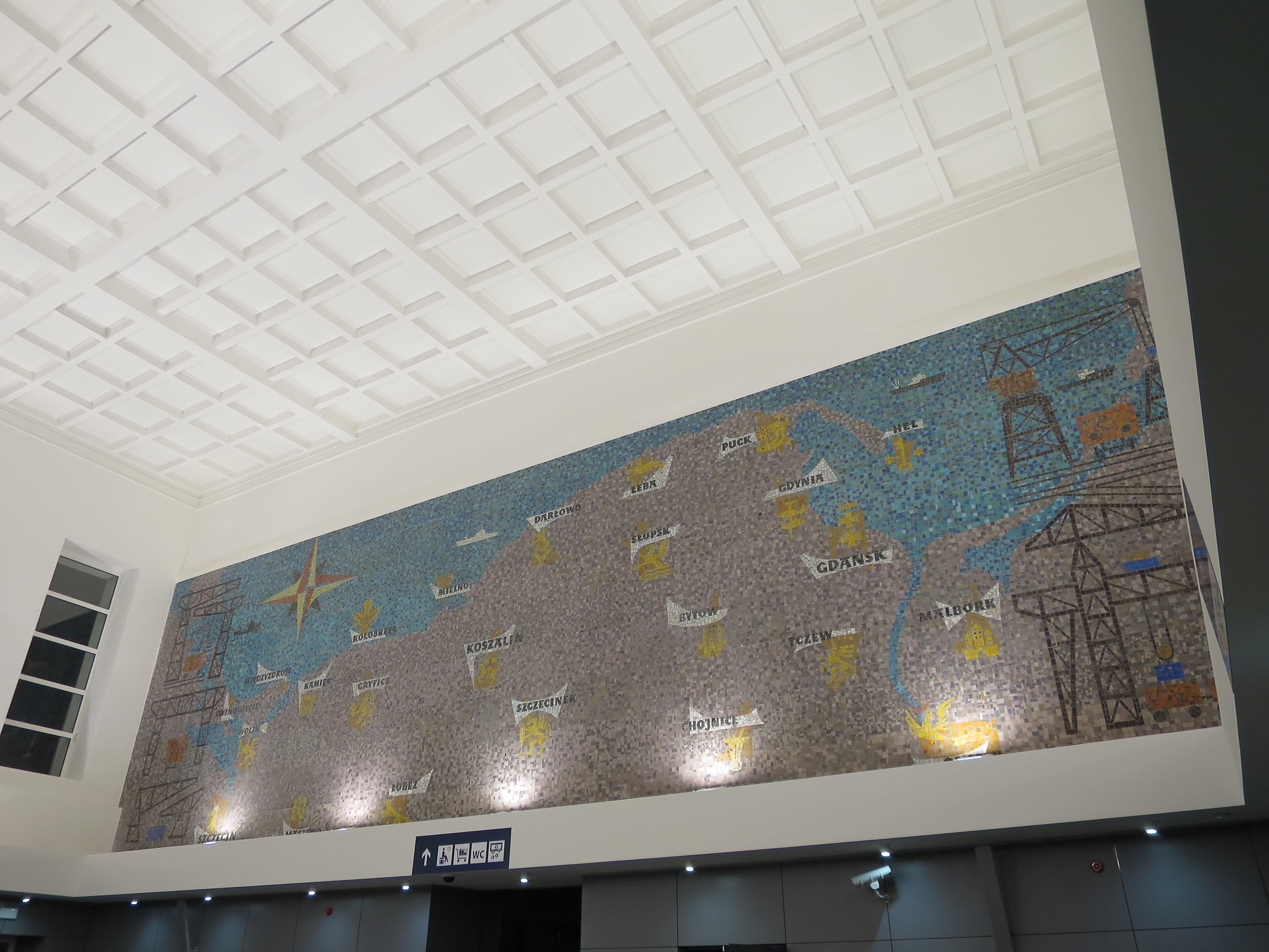 Szczecin Główny po modernizacji zakończonej 29.04.2016 r.